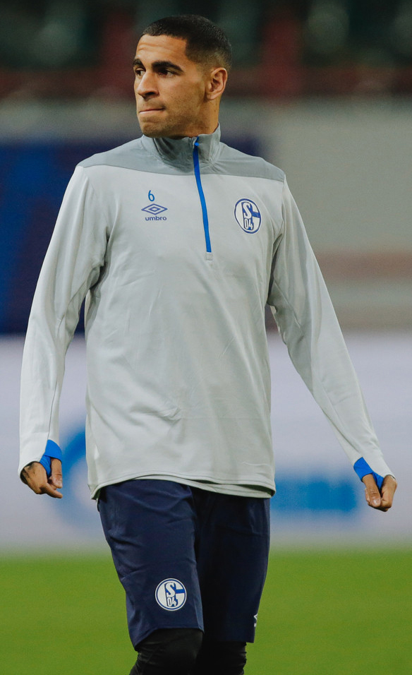 «Шальке» провел тренировку перед матчем с «Локомотивом»